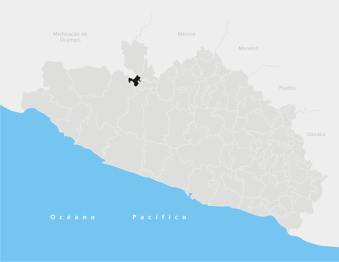 Pungarabato en el estado de Guerrero (México)